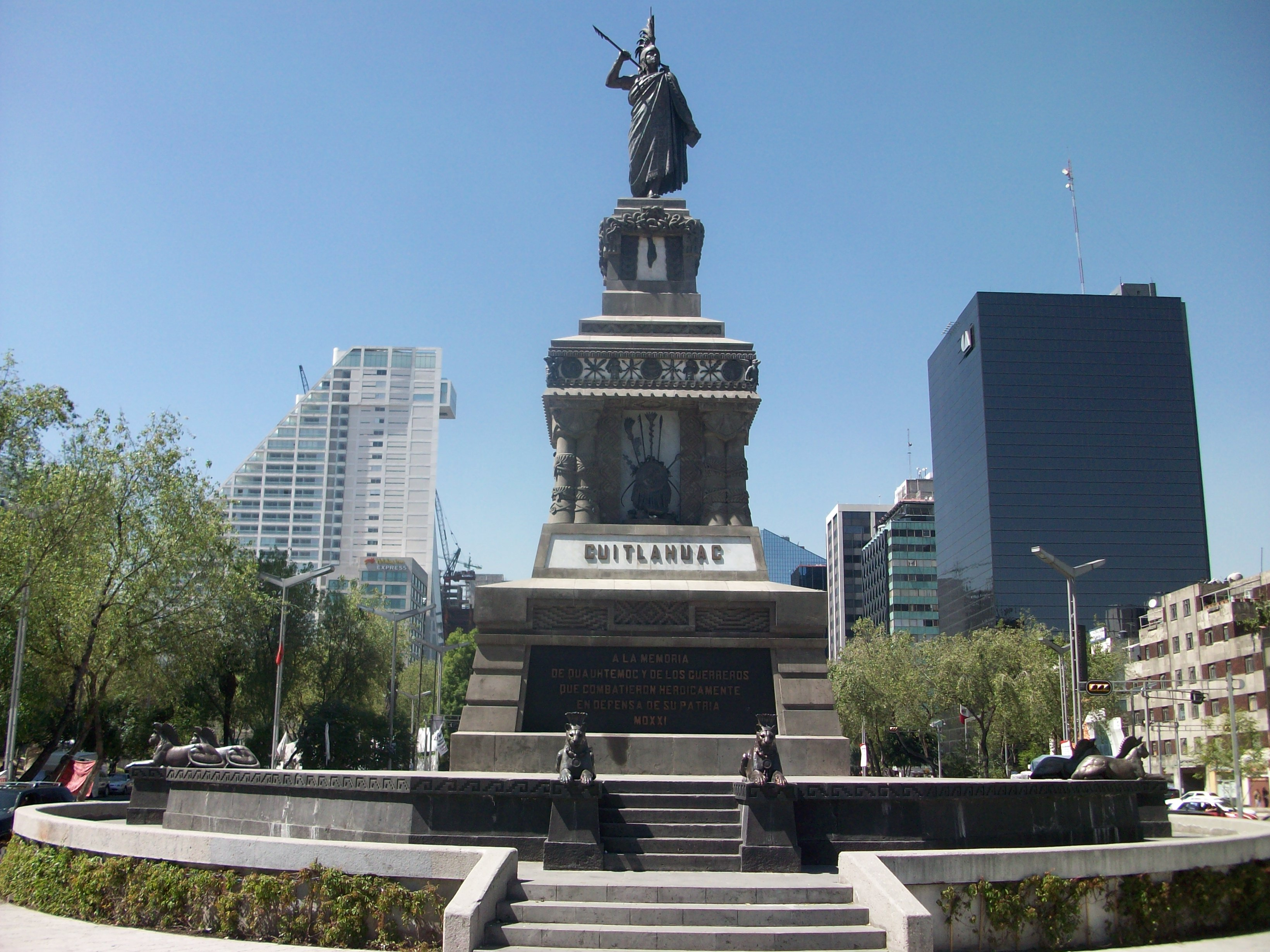 Monumento a Cuauhtémoc en Paseo de la Reforma